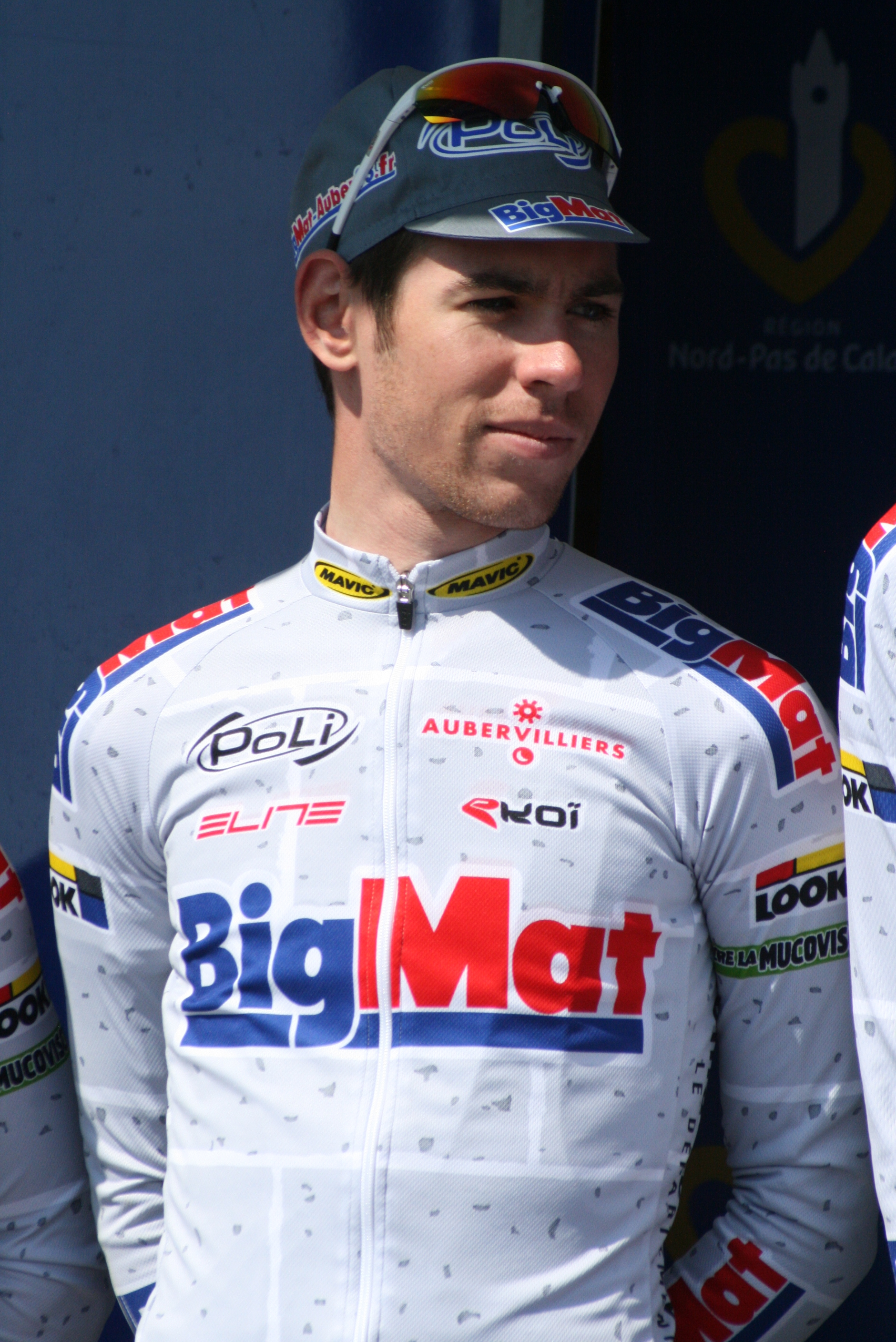 Présentation des coureurs au départ de la première étape Arnaud Molmy